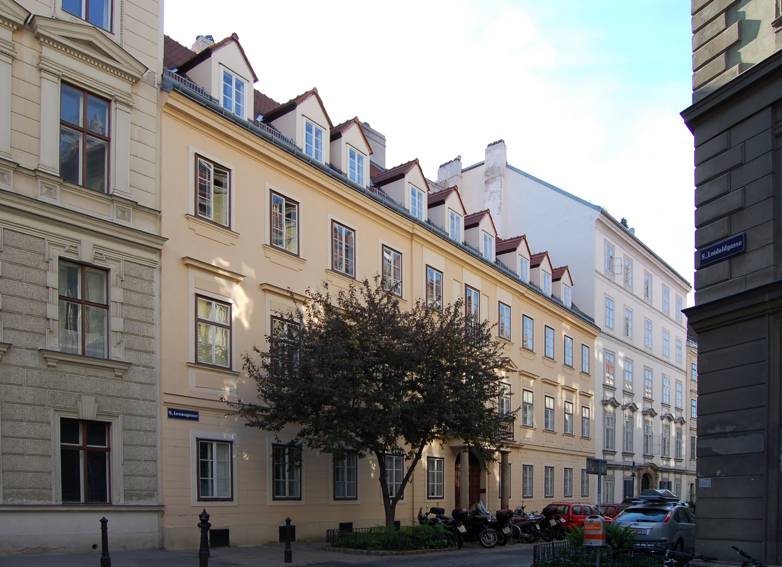 Das denkmalgeschützte Gebäude in der Lenaugasse 7 in Wien-Josefstadt.